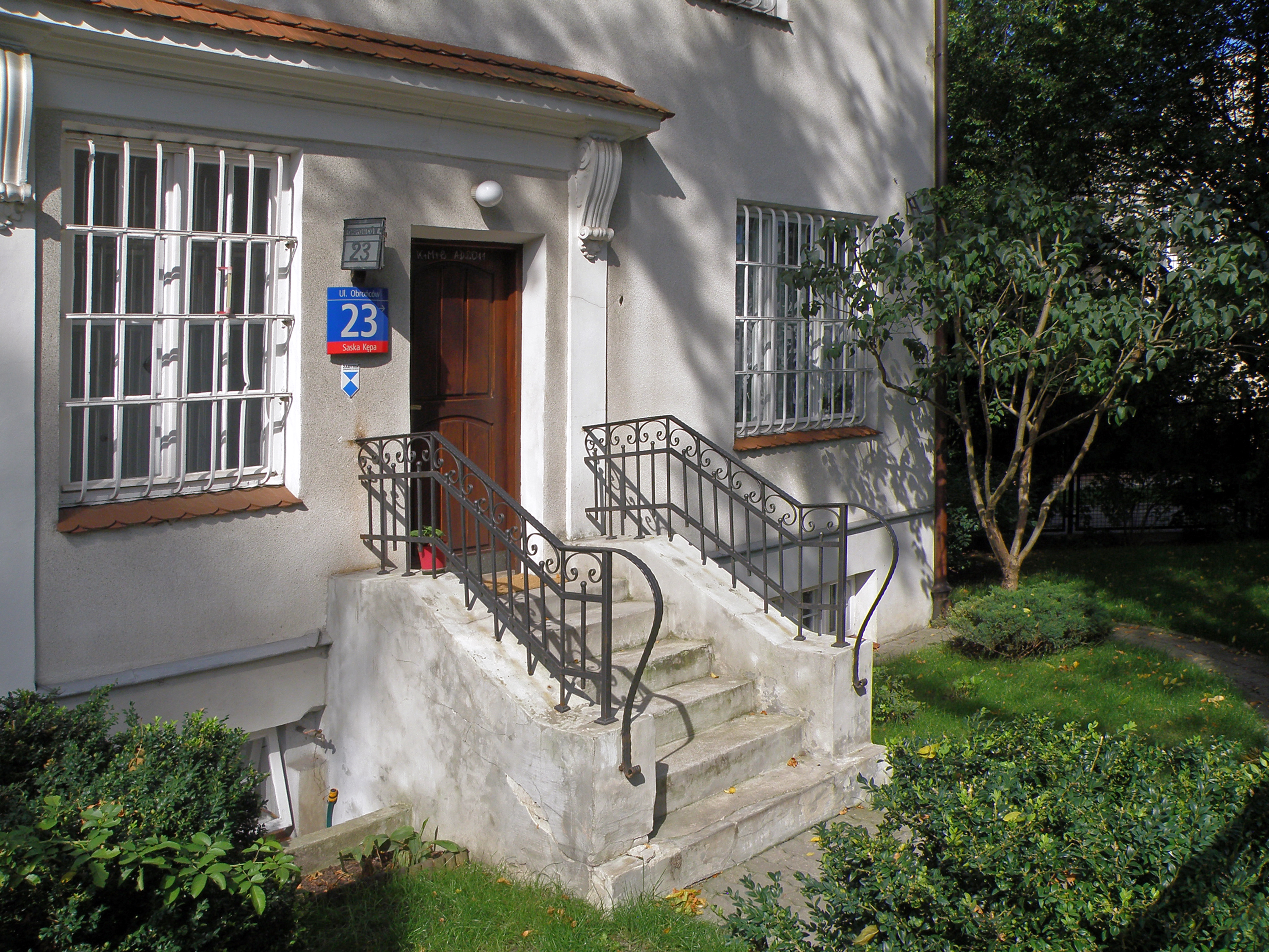 Dom, ok. 1930, ul. Obrońców 23 (966 A z 13.06.1979), Warszawa.